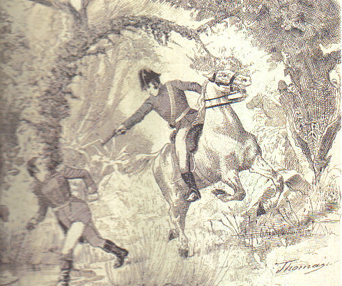 Flag Of Morelos